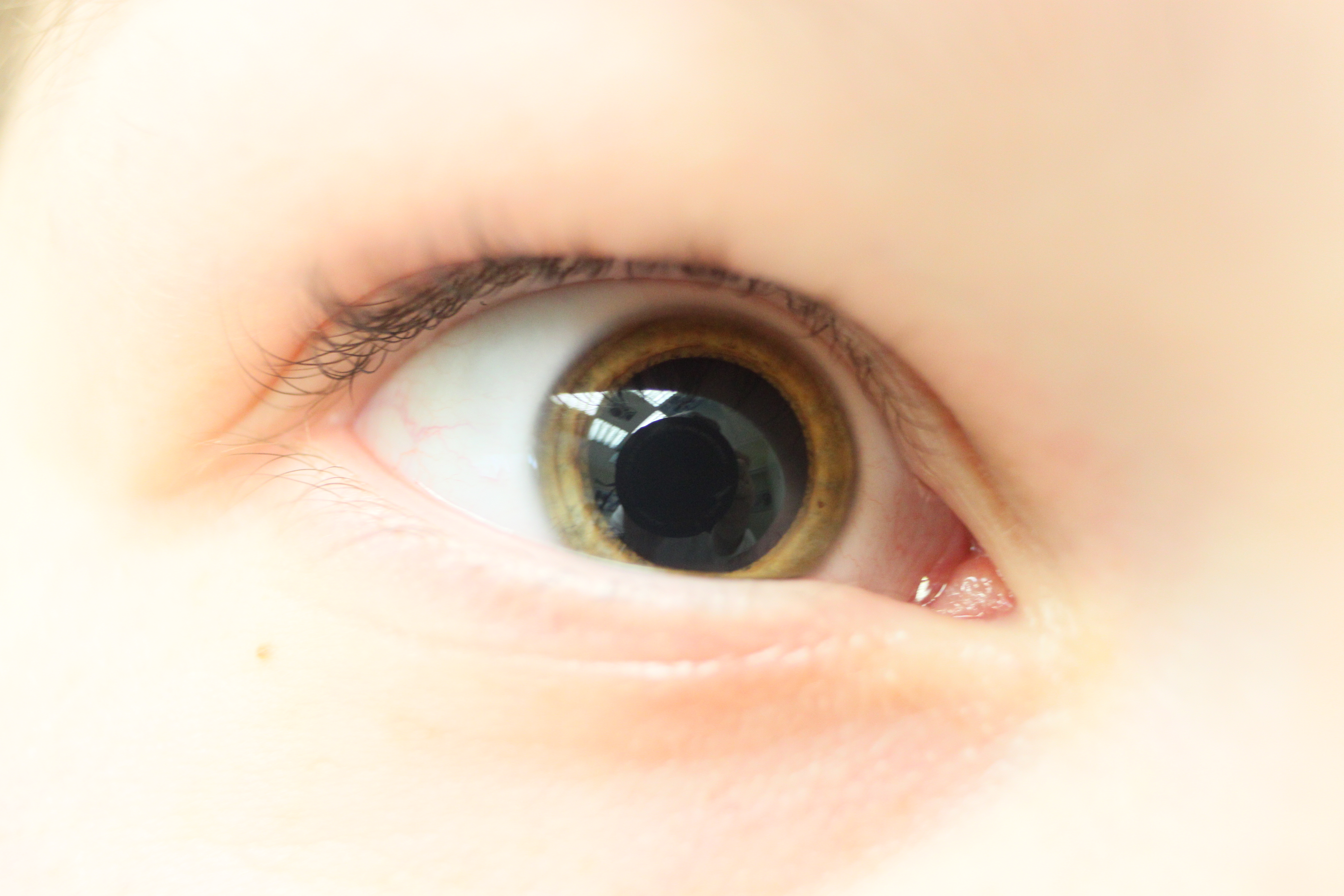 Mydriasis